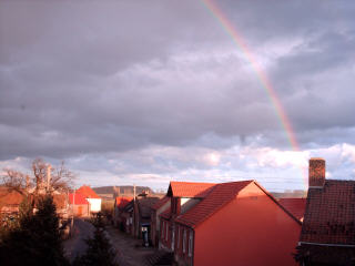 Eschenrode